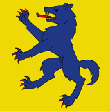 Flag of Steinach, Canton of St. Gallen - Flago de Steinach, Kantono de Sankt-Galo